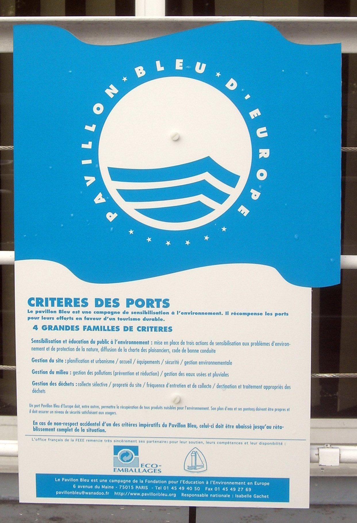 Description = Affichette du pavillon bleu apposée à la capitainerie de La Rochelle Source =Photo taken by Remi Jouan Date =Septembre 2006 Author =Remi Jouan